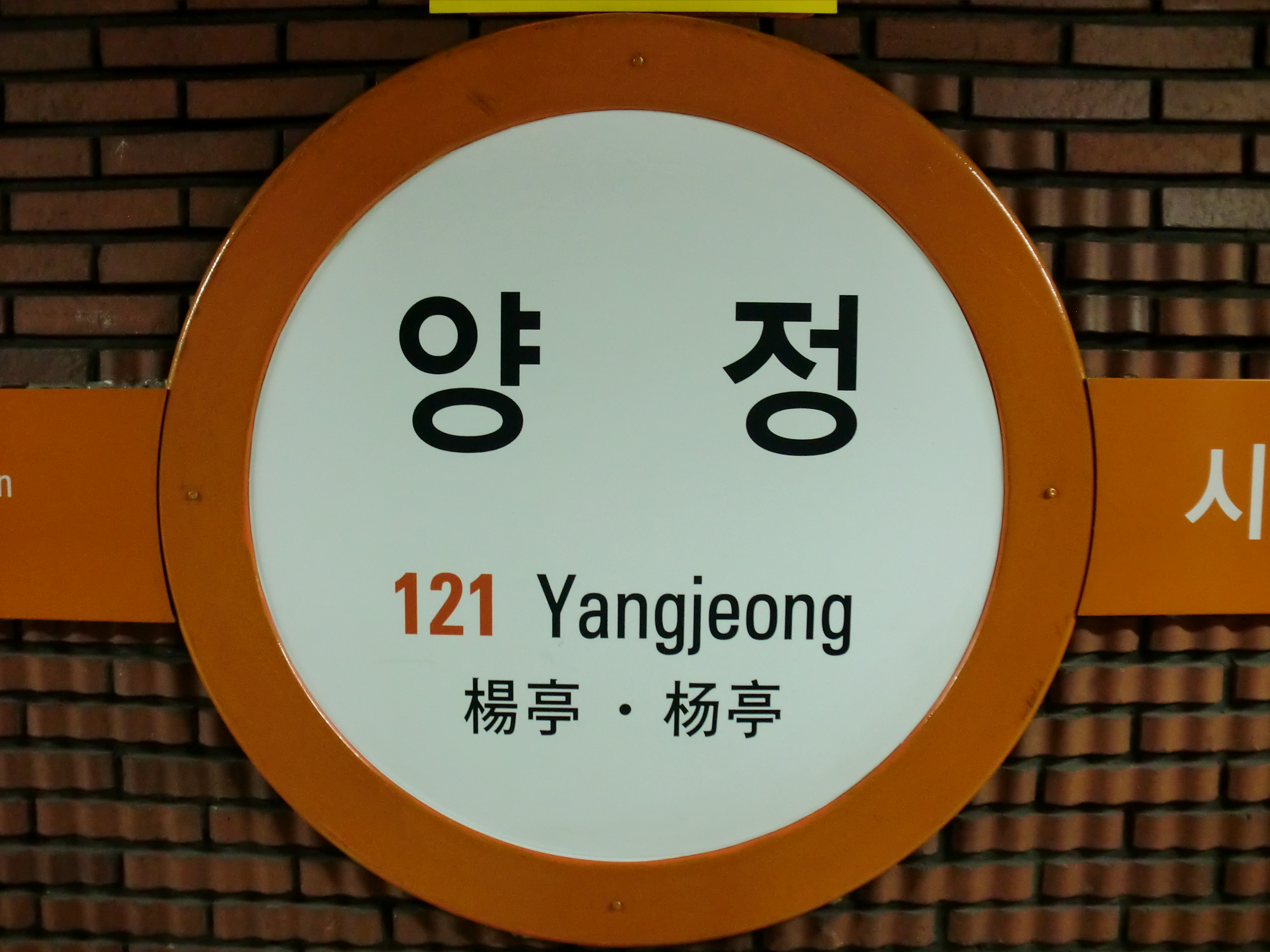 부산도시철도 양정역 역명판 (2013년)